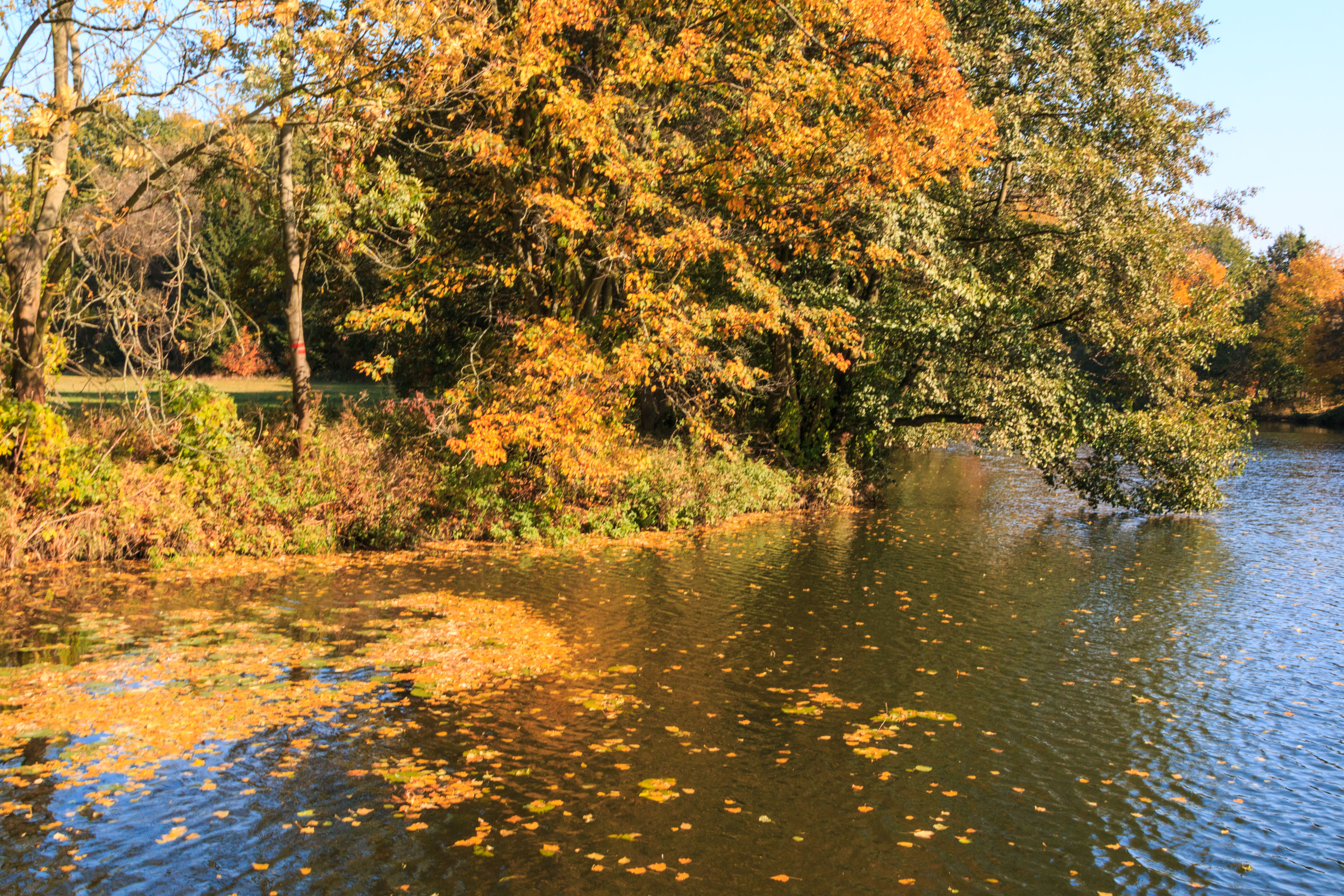 Kašparovo jezero - mrtvé rameno Orlice u Hradce Králové Project: Vodstvo.